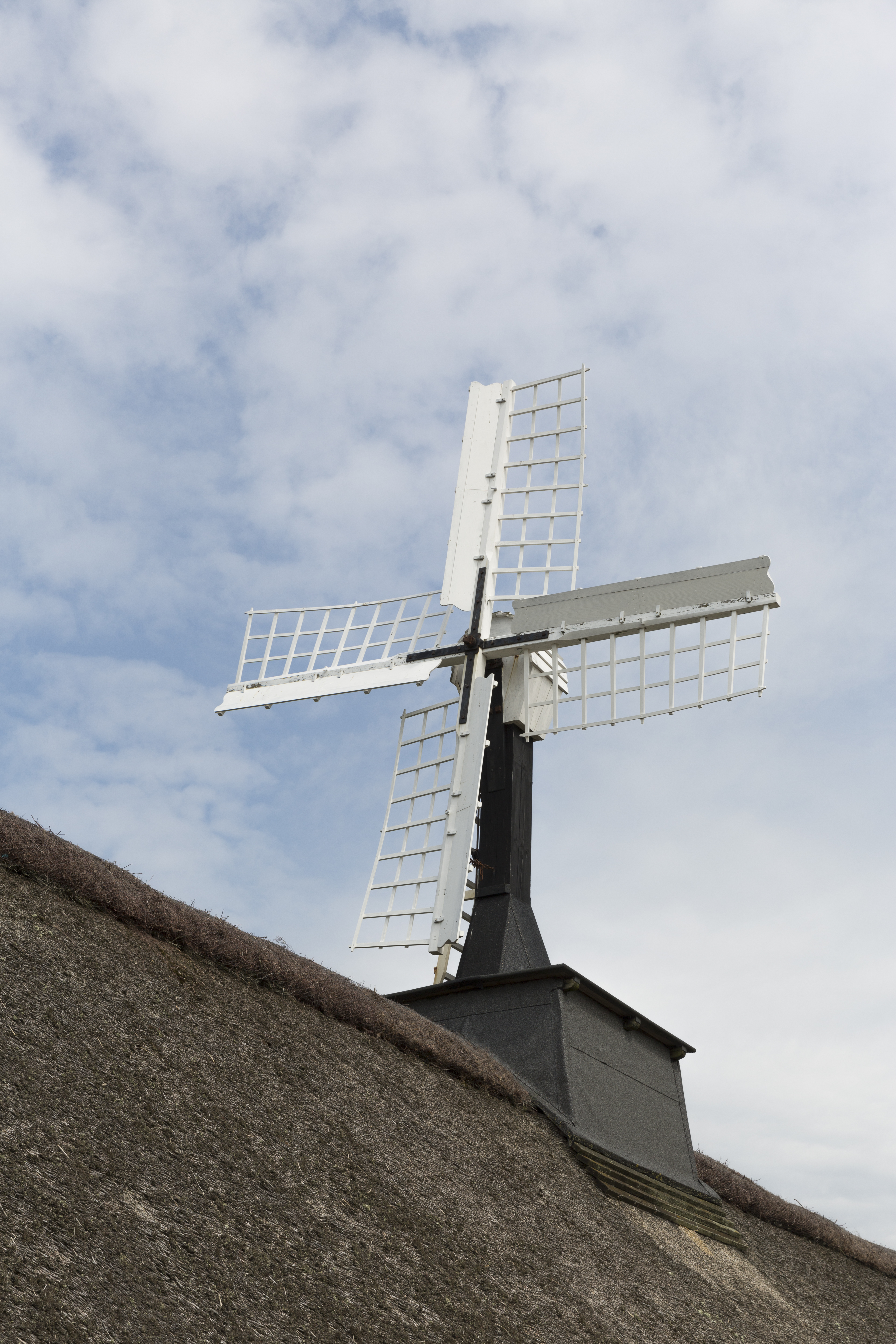 Østerklit Stokmølle rotor